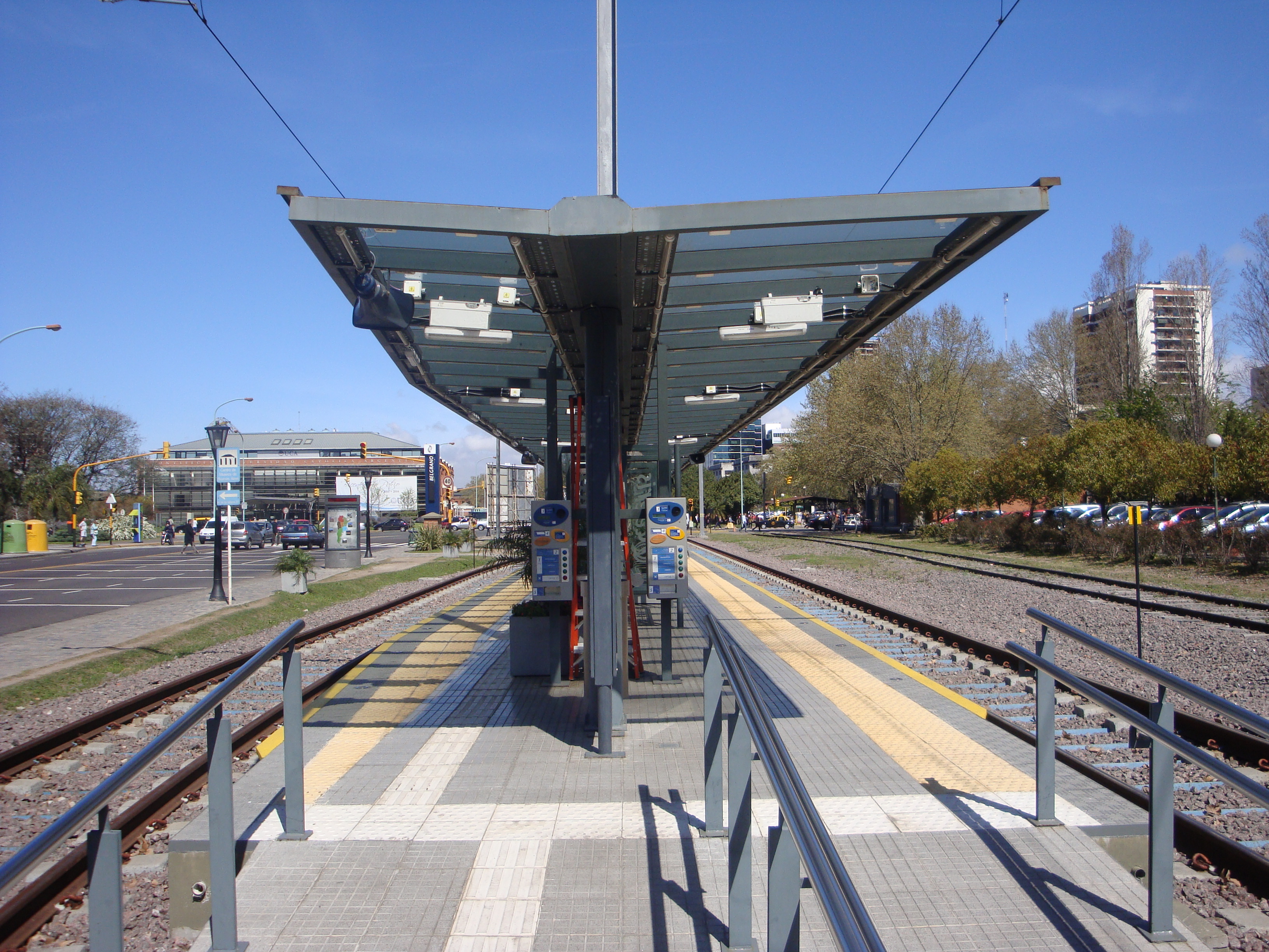 Estación Belgrano del Tren del Este, Ciudad de Buenos Aires